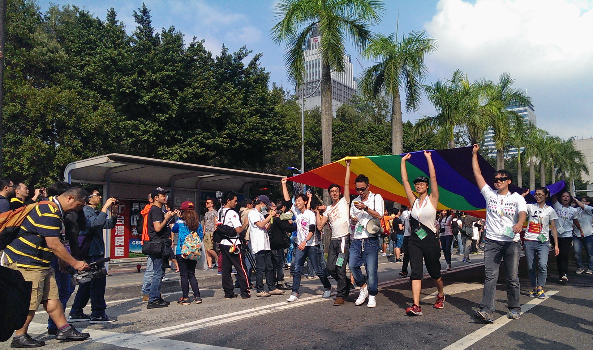 中文（台灣）: 2013台灣同志遊行